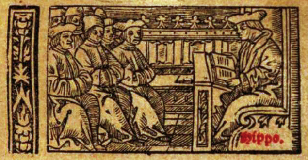 Frontispice